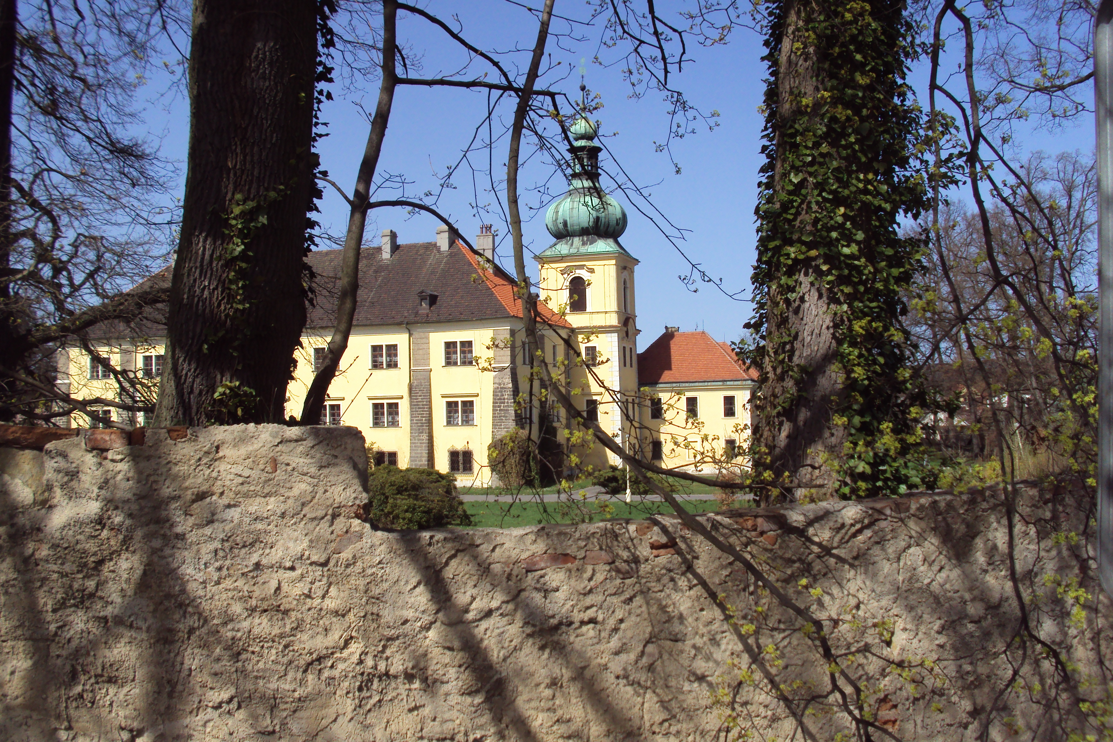 Zámek Doksy je ve městě